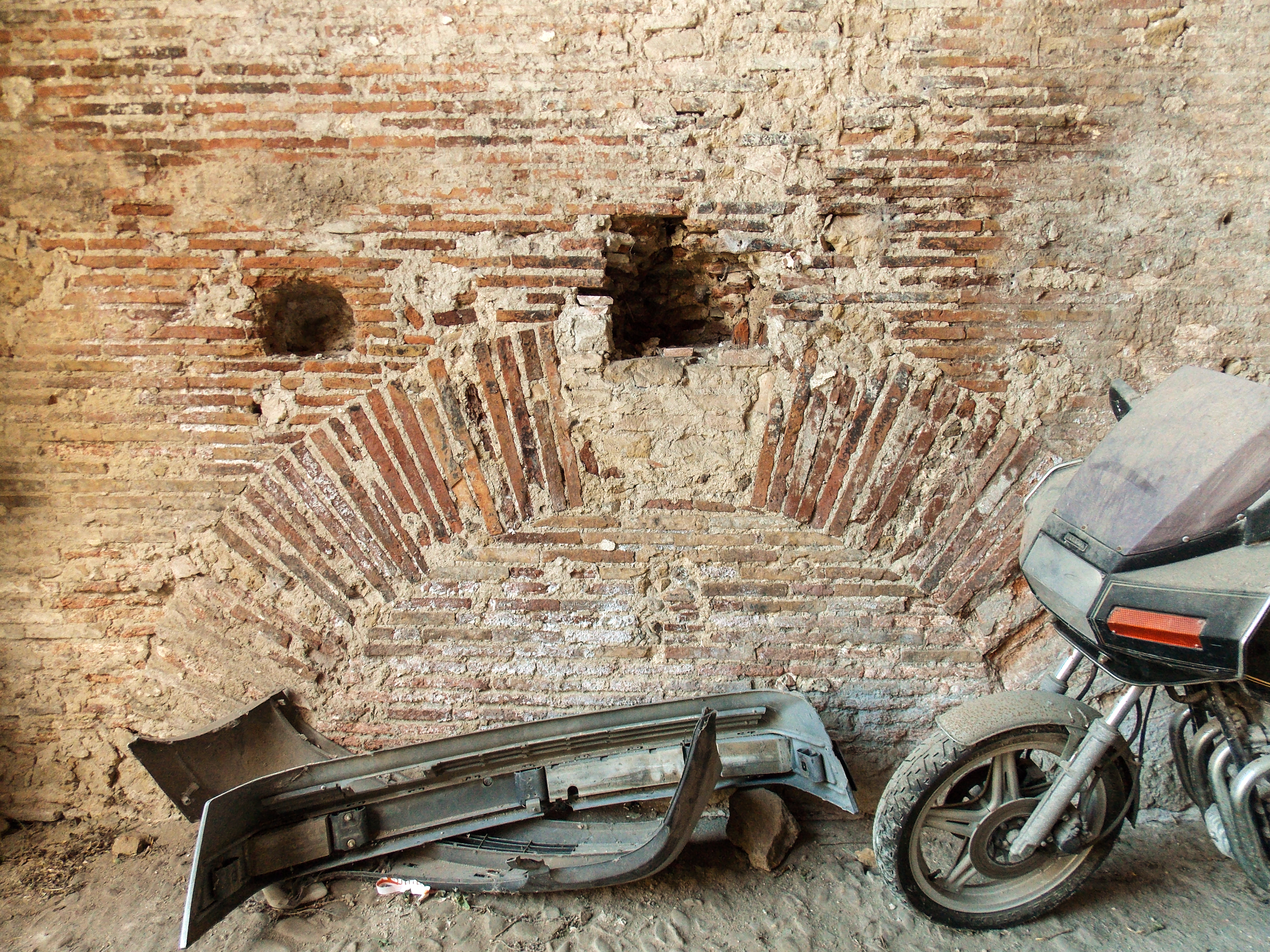 I resti delle terme romane di San Cristiano (II sec. d.C.) nel rione Triggio a Benevento: un arco nella parte bassa di un muro